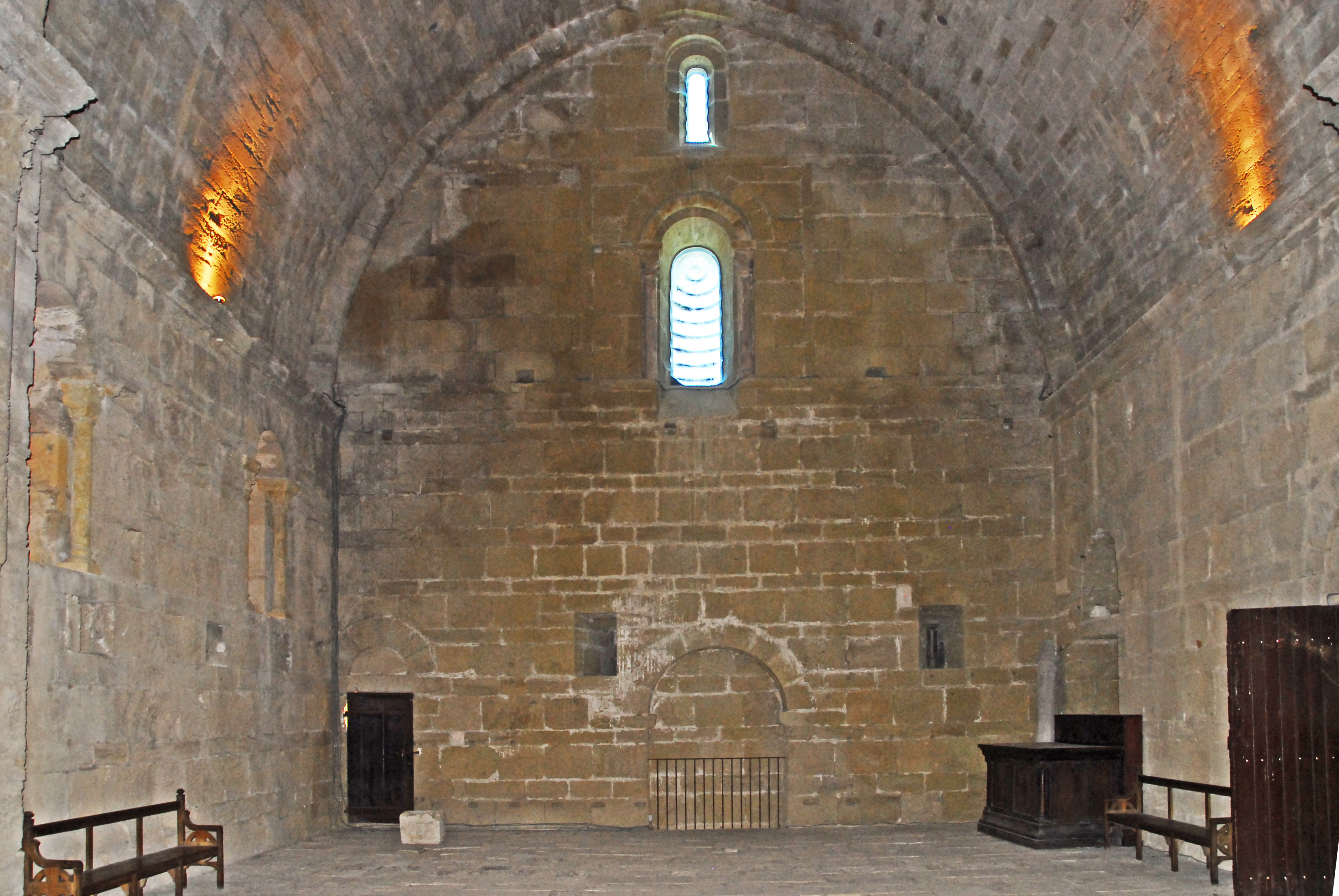 St-Pierre-et-St-Paul de Maguelone, Wastwand über Empore